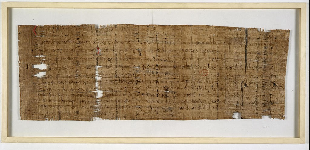 Ratification par le roi Dagobert Ier d'un partage entre deux frères nommés Ursin et Beppolen